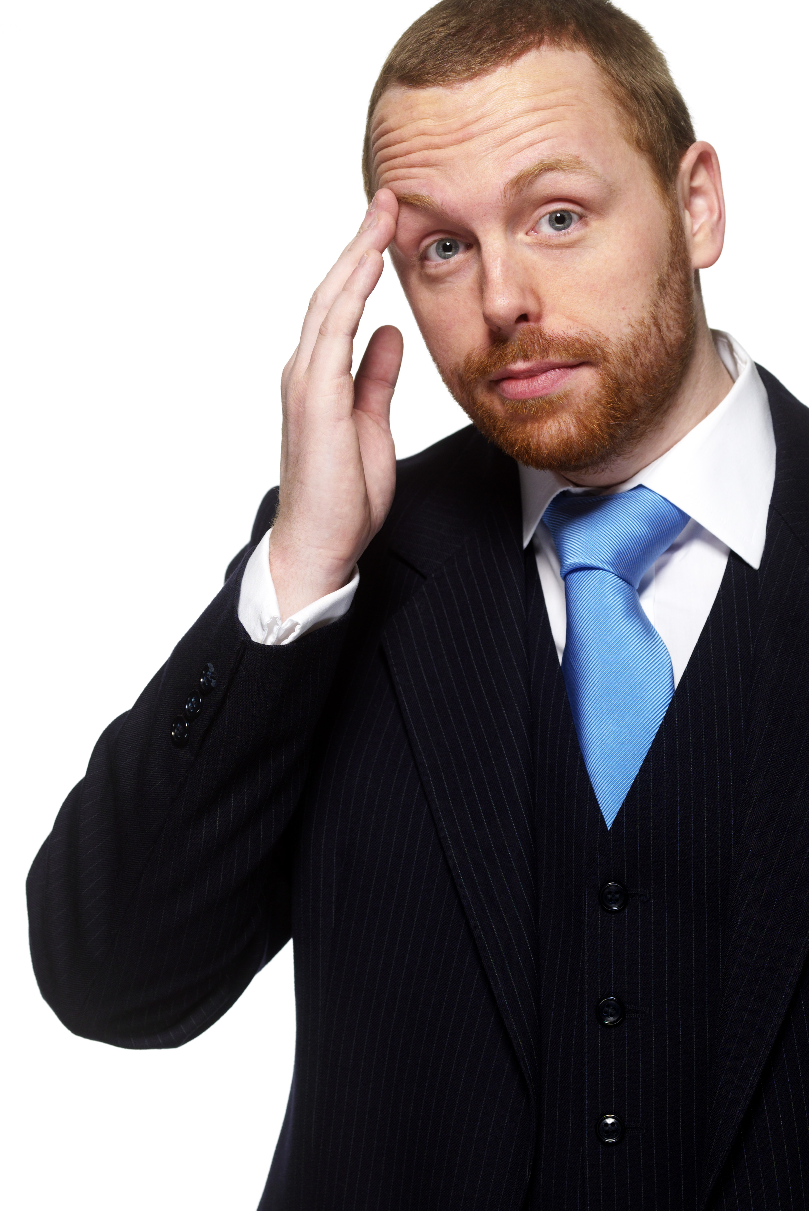 Artisten Jesper Sjöberg.